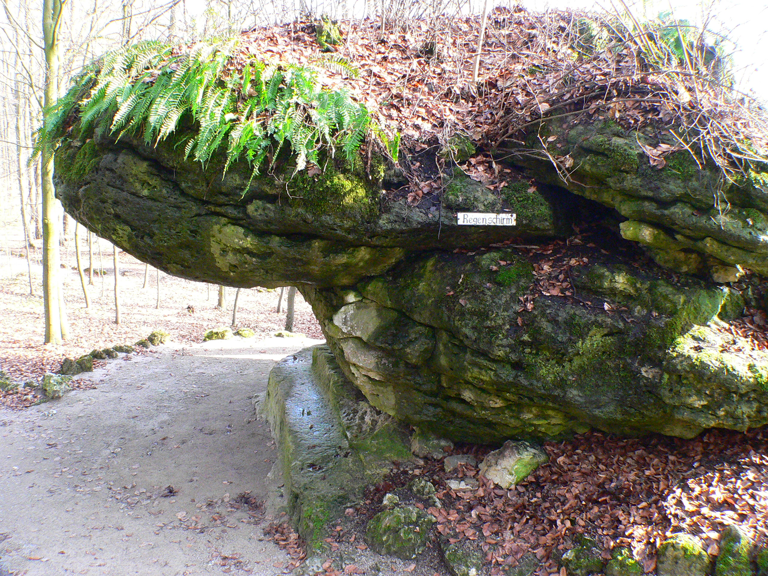 Felsengarten Sanspareil, "Regenschirm" - Fränkische Schweiz, Bayern